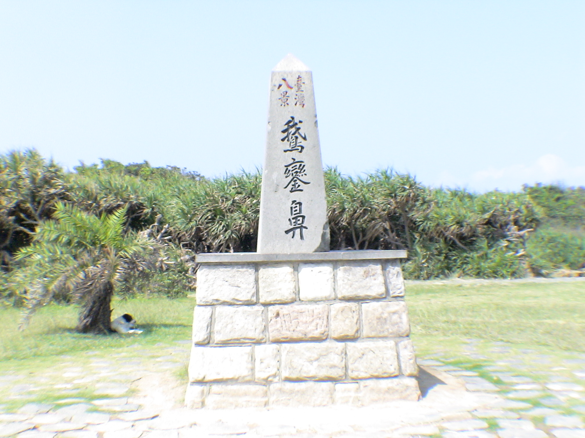 「臺灣八景鵝鑾鼻」石碑，位於鵝鑾鼻公園。